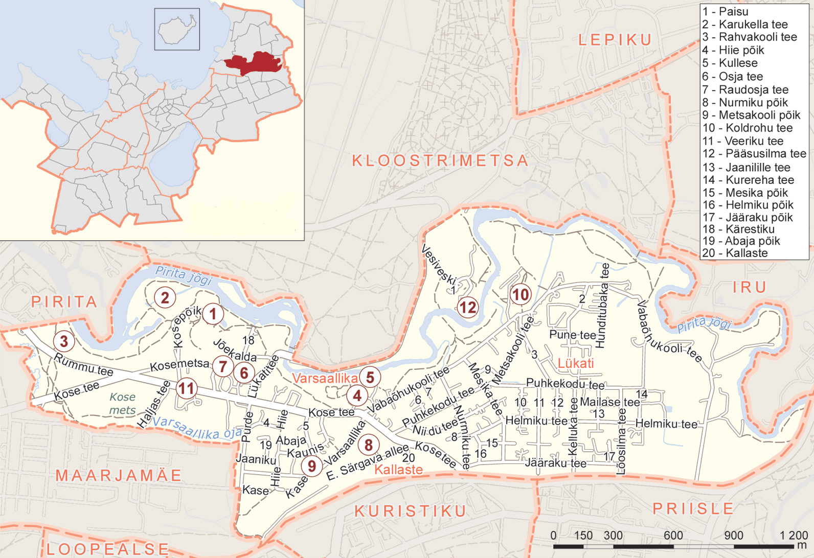 Kose asumi kaart